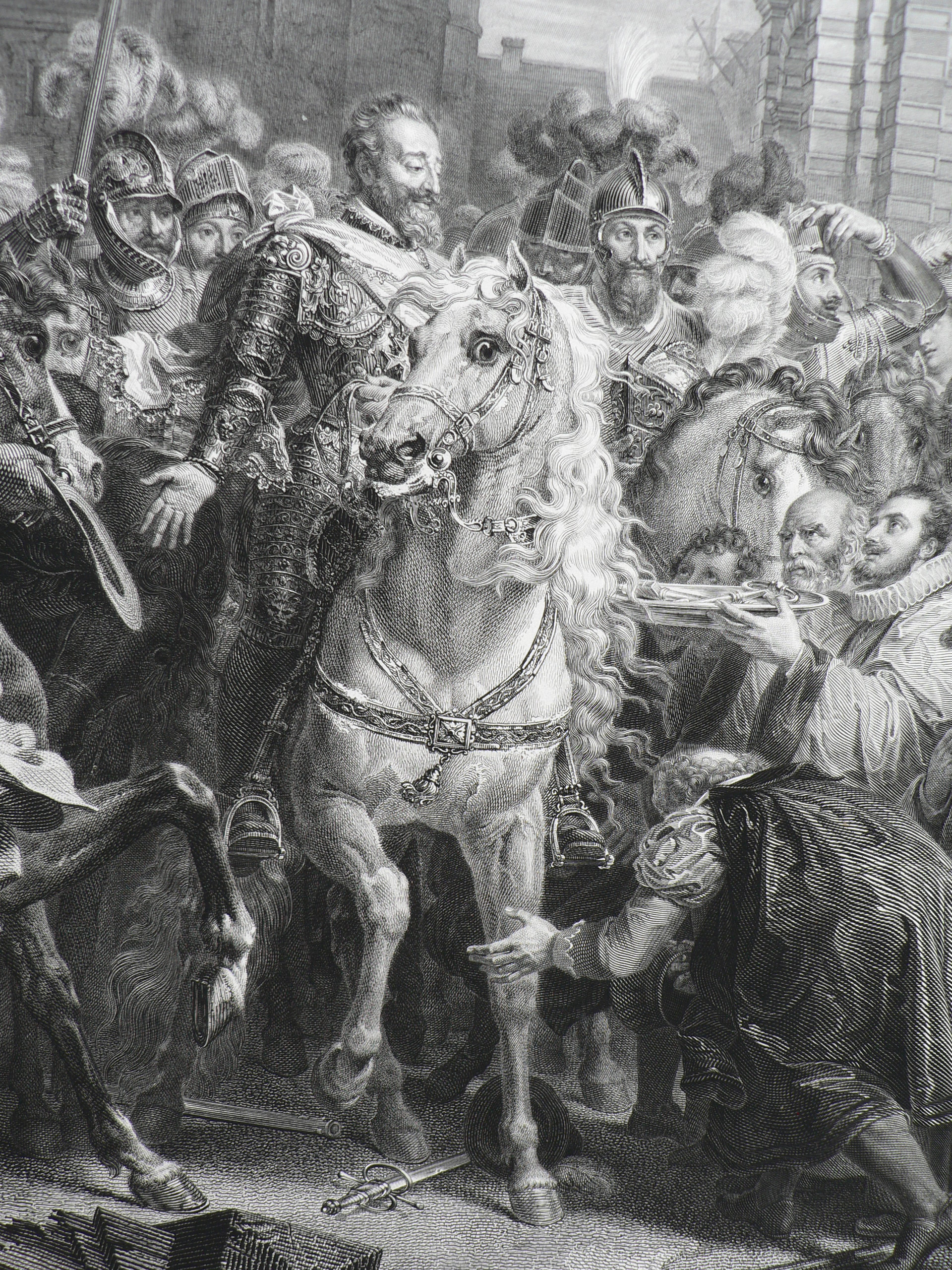 Entrée d'Henri IV à Paris en 1594 (vue partielle)